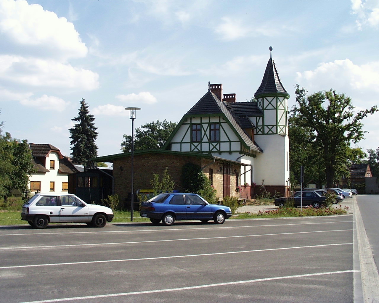 Der Bahnhof in Burg im Spreewald